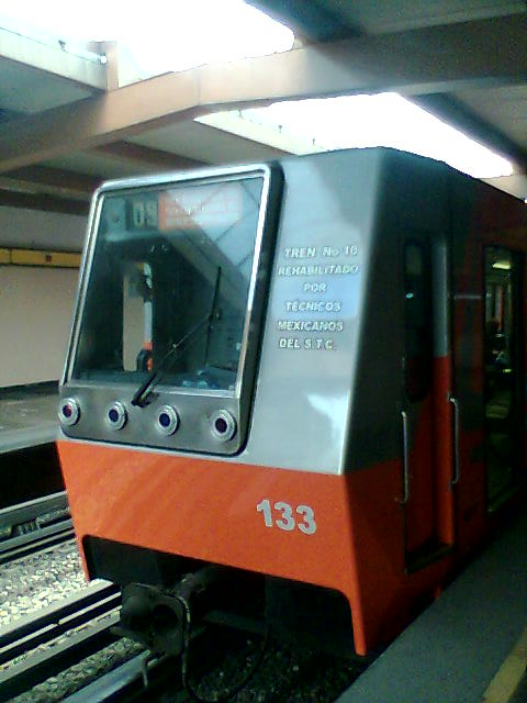 tren cncf nm-73 linea 5